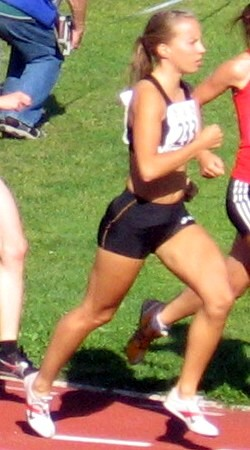 Saara Skyttä yleisurheilun 22-vuotiaiden SM-kisoissa Porin stadionilla